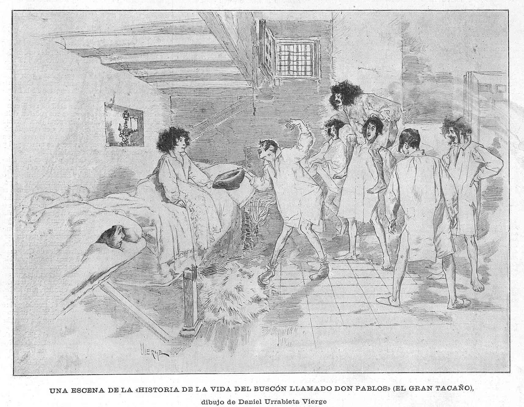 Ilustración de la «Historia de la vida del buscón llamado don Pablos», en la revista La Ilustración Artística.